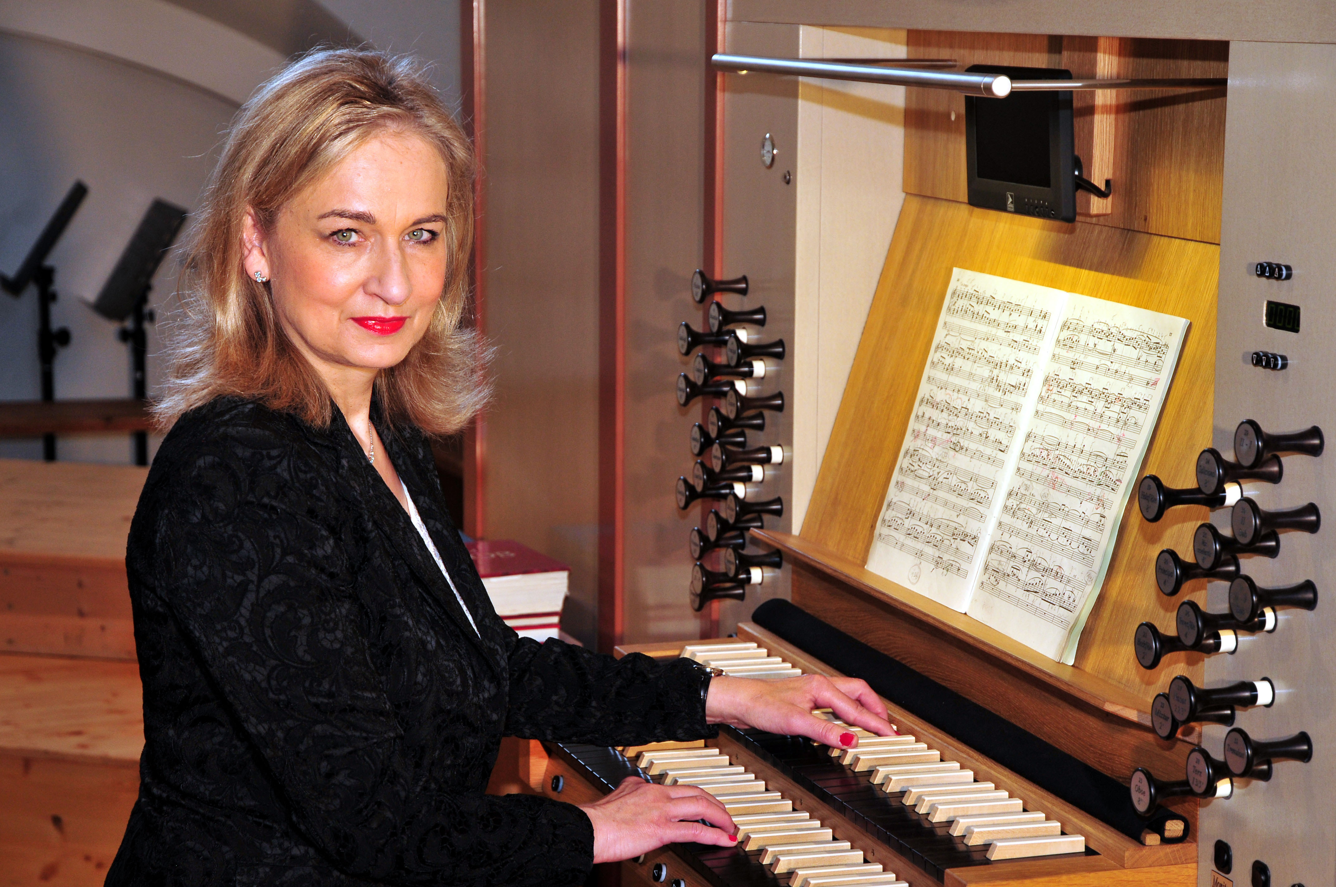 Picture of Prof.Marlene Hinterberger on the organ